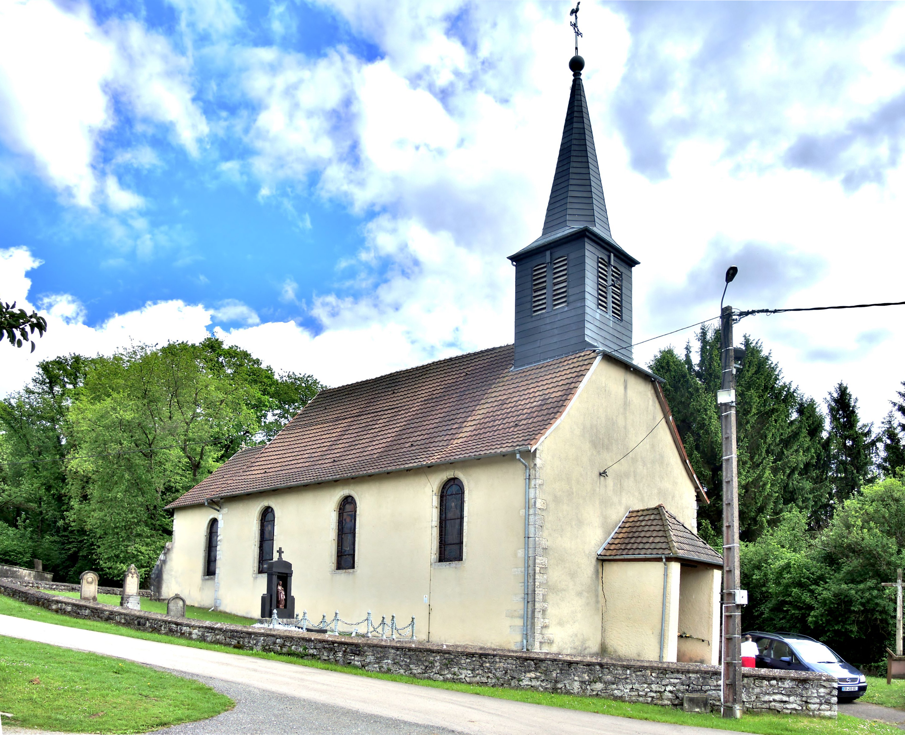 Eglise saint Etienne. Brebotte. Territoire de Belfort